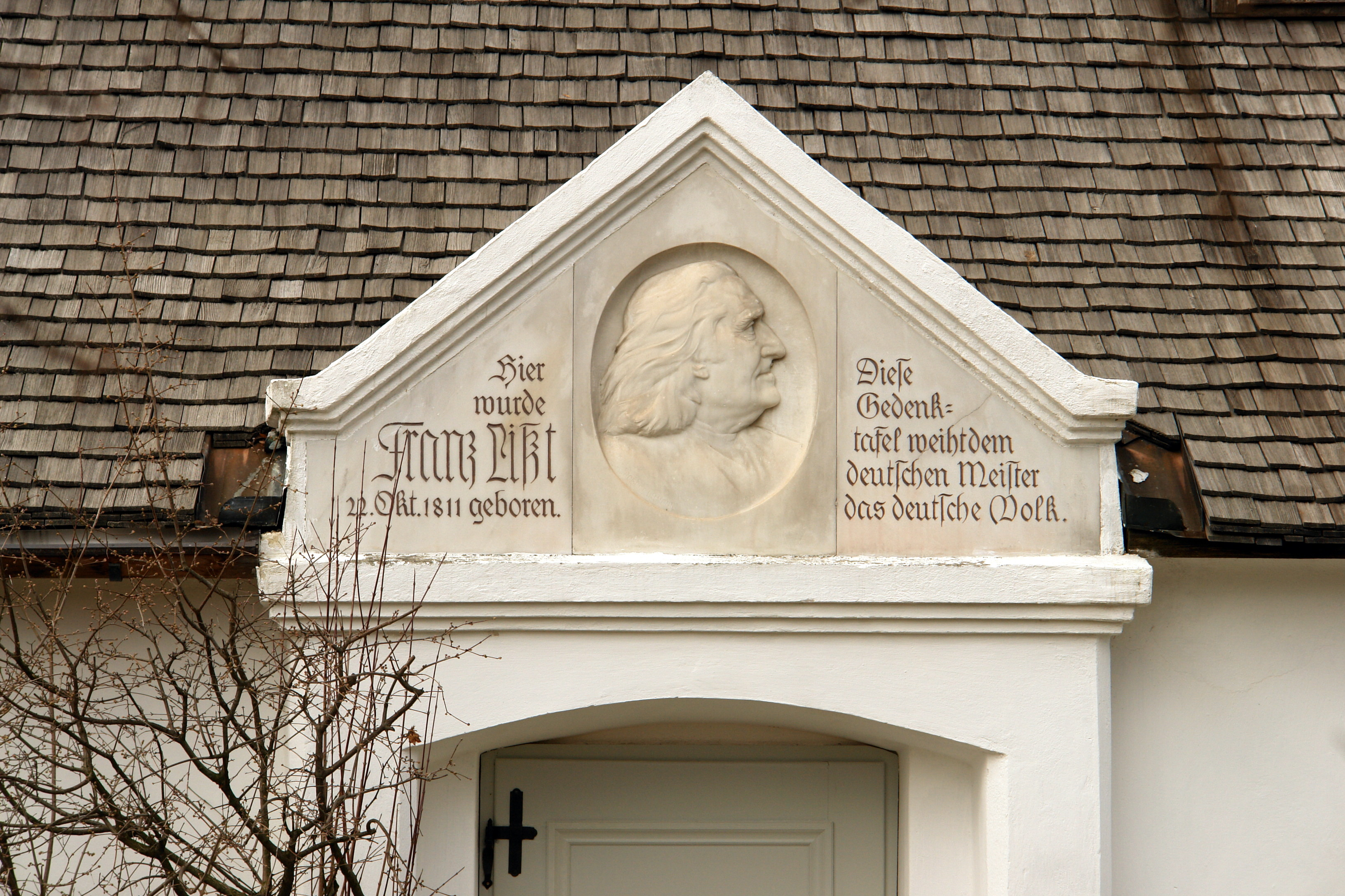 Liszt Ferenc szülőházának bejárata